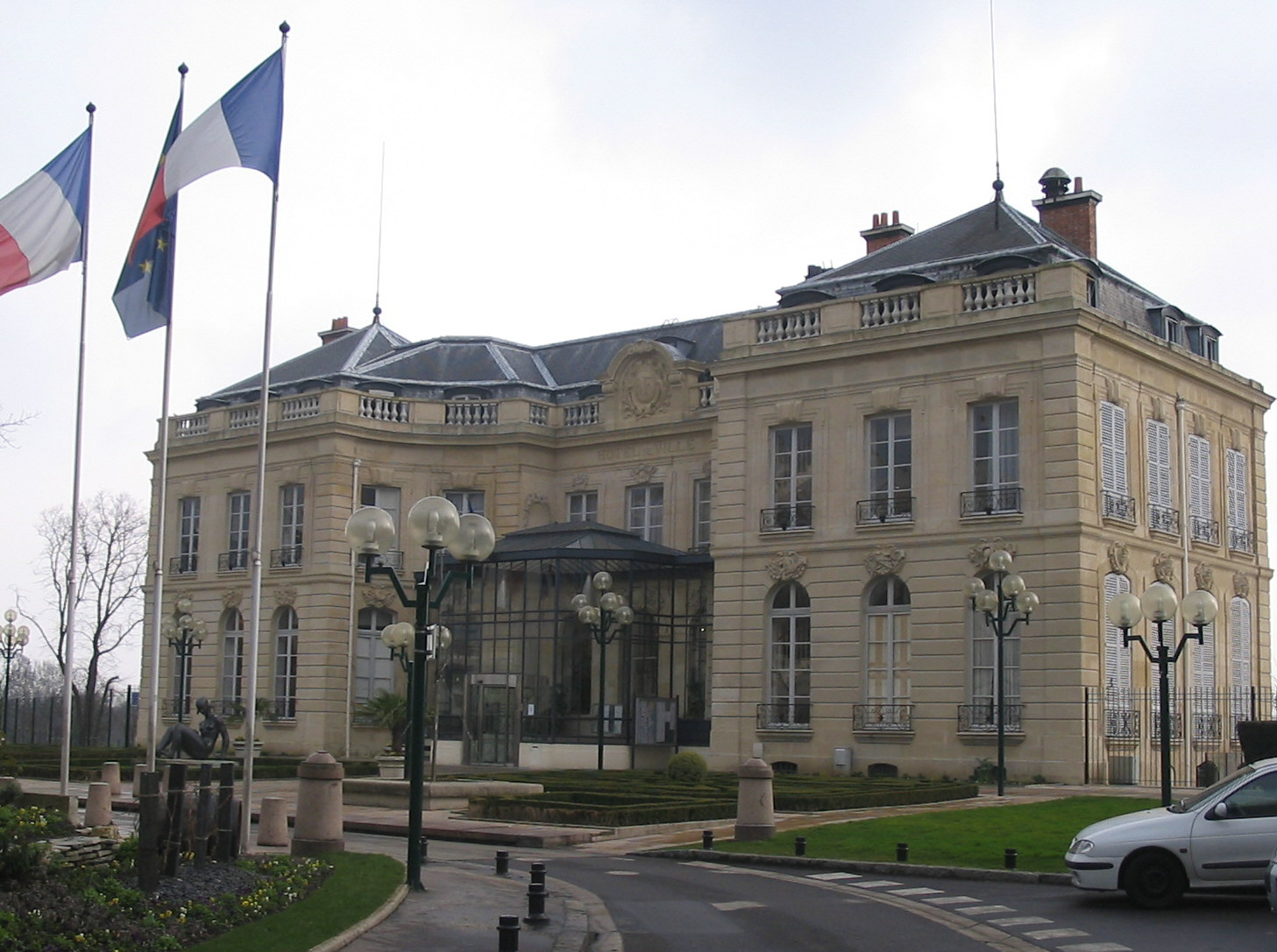 Mairie d'Epinay-sur-Seine (93). Je suis l'auteur du cliché pris au printemps 2005 Town hall of Épinay-sur-Seine, Seine-Saint-Denis, France. I have taken this picture in spring 2005. Licensing Catégorie:Épinay-sur-Seine